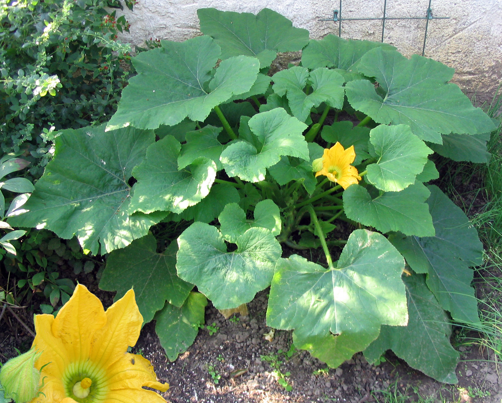 Kürbispflanze Patisson / vergrößerte Blüte links unten